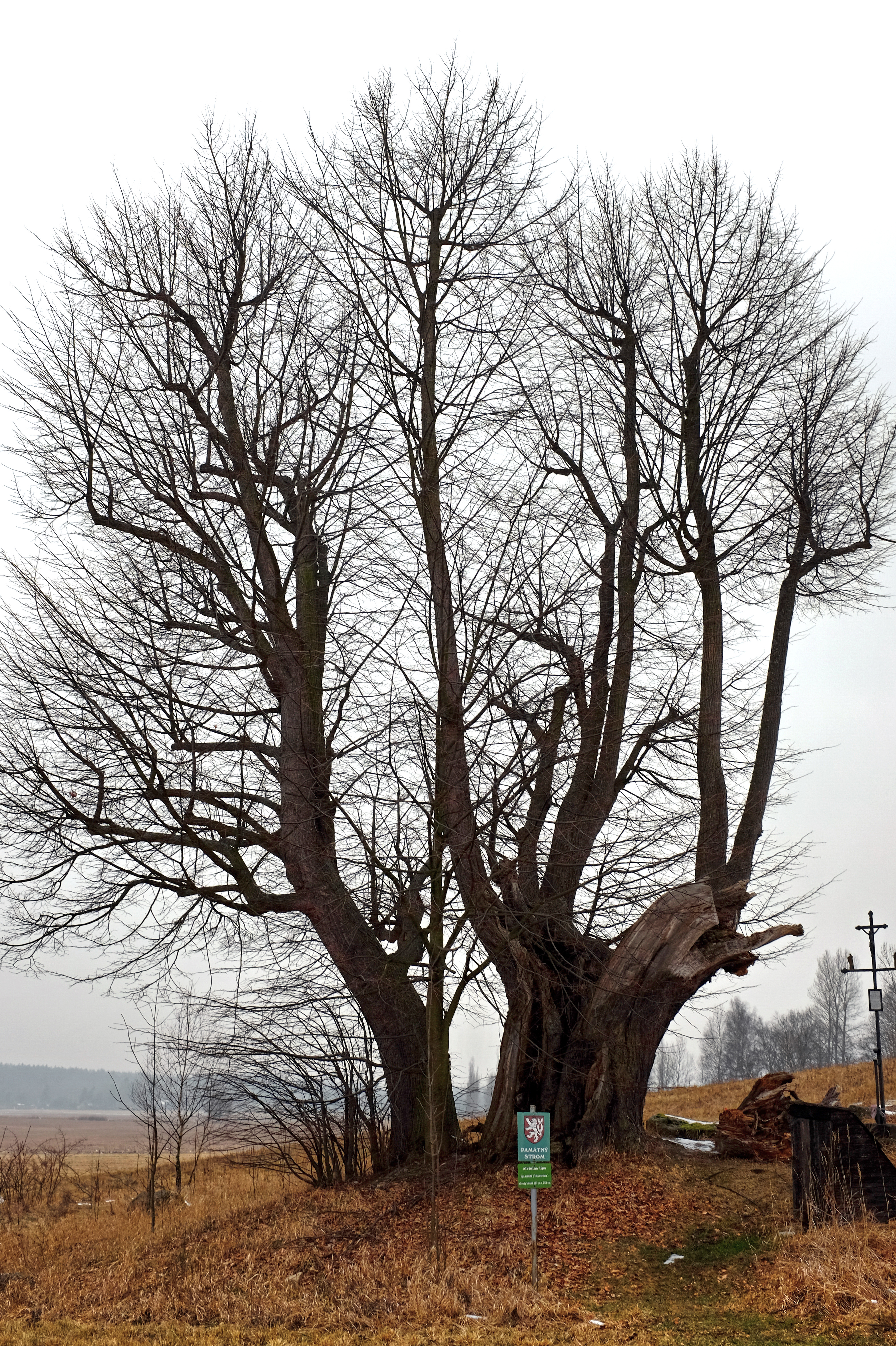 Památný strom - Alvínina lípa - Andělská Hora, okres Karlovy Vary